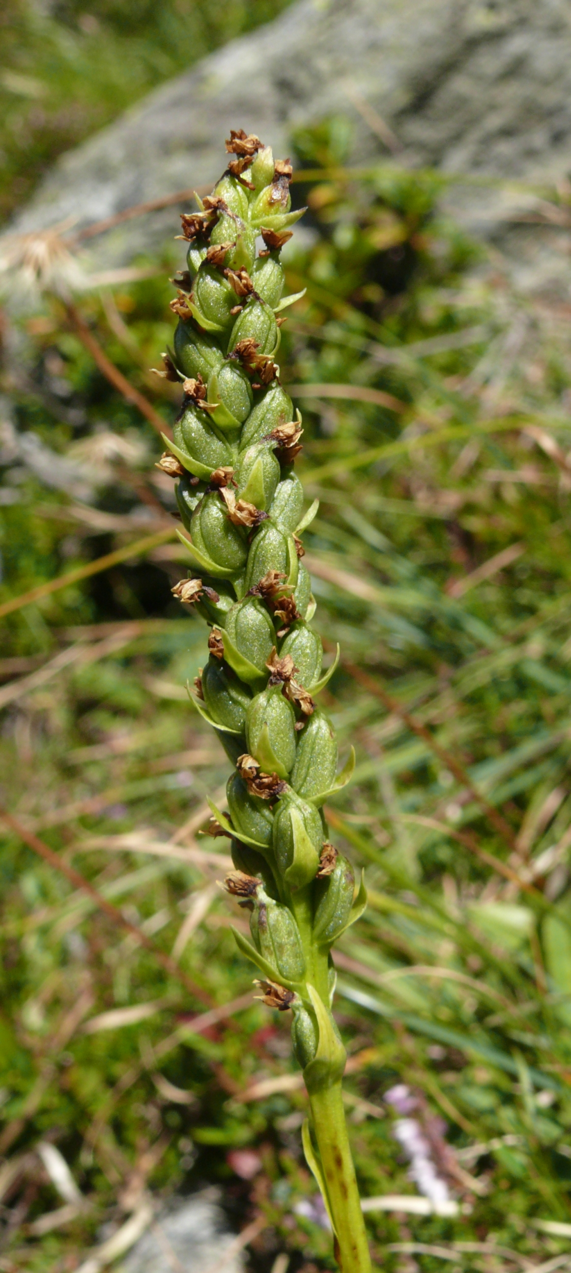 Pseudorchis albida, Zillertaler Alpen, Italien